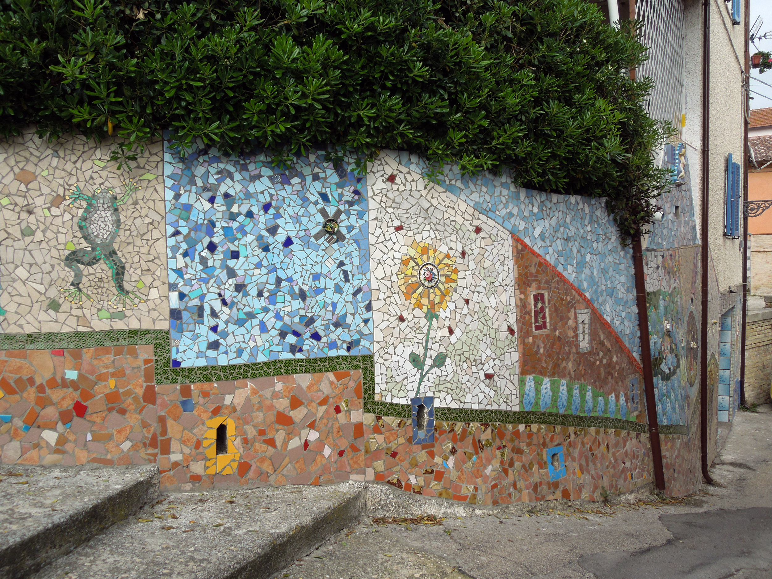 Scorcio interno del paese di Ripattoni in provincia di Teramo.